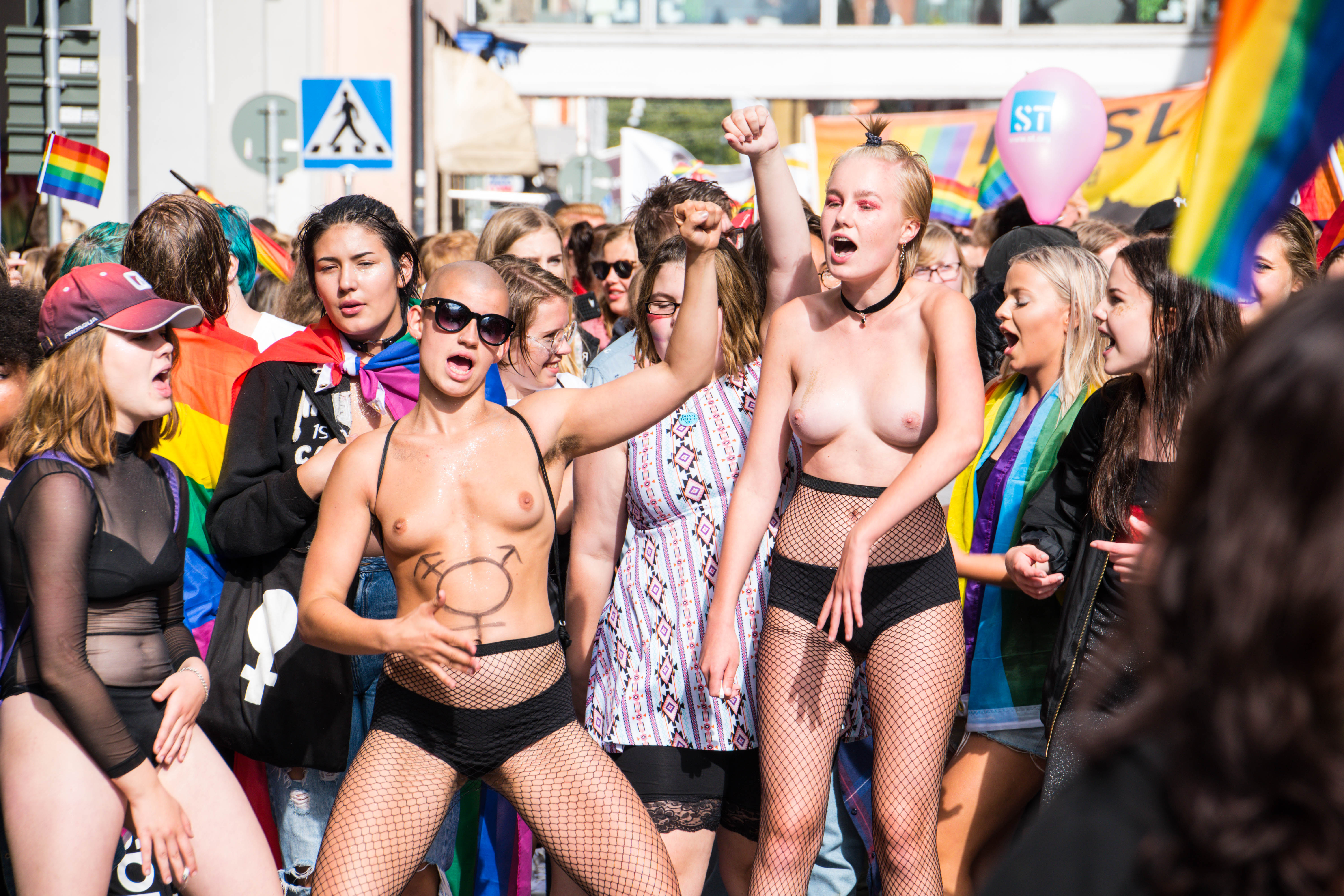 Malmö Pride 2016, Malmö, Sweden